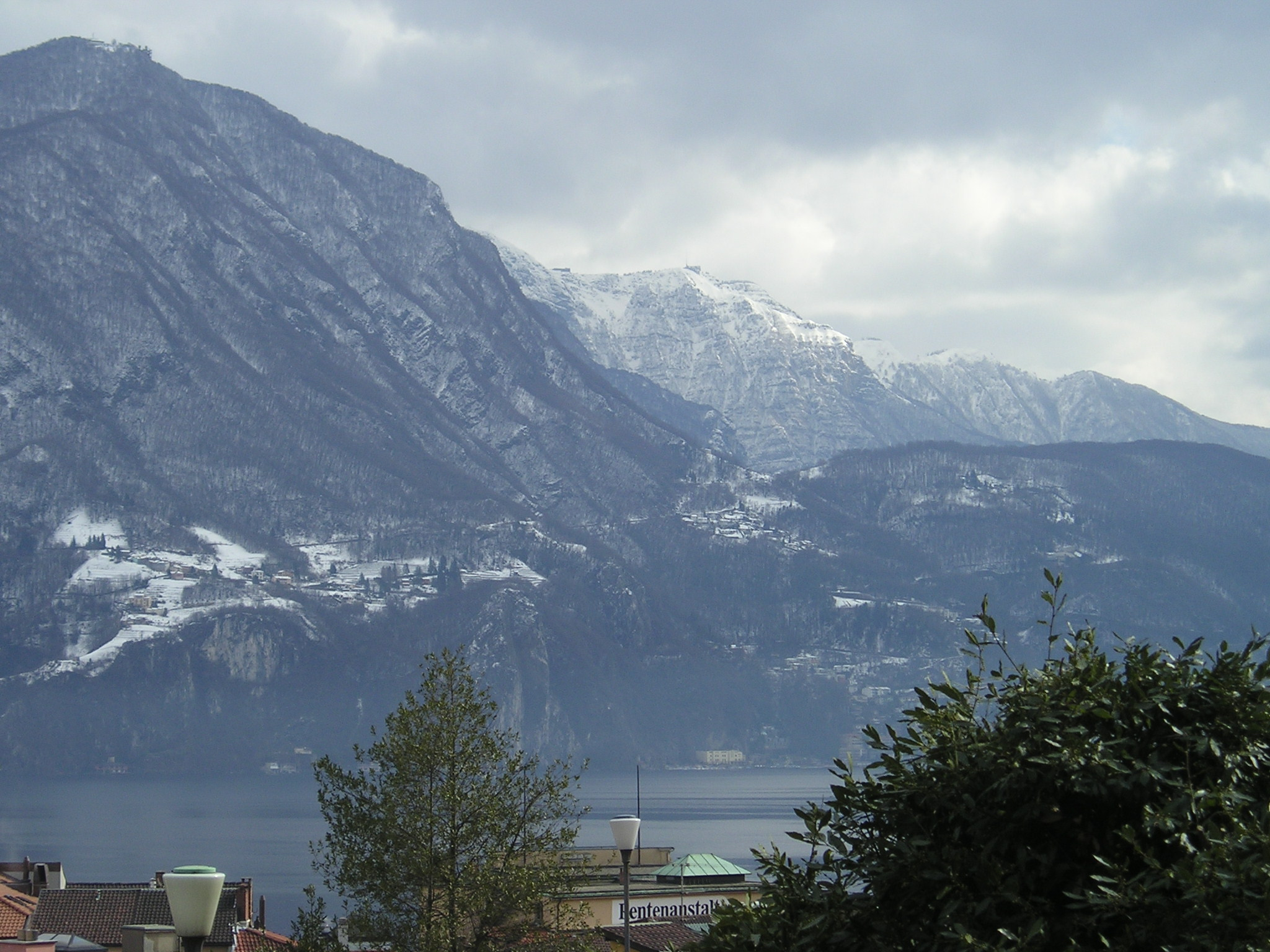 Vista sul Monte Generoso d'inverno da Lugano 7 Monte Generoso from Lugano during the winter